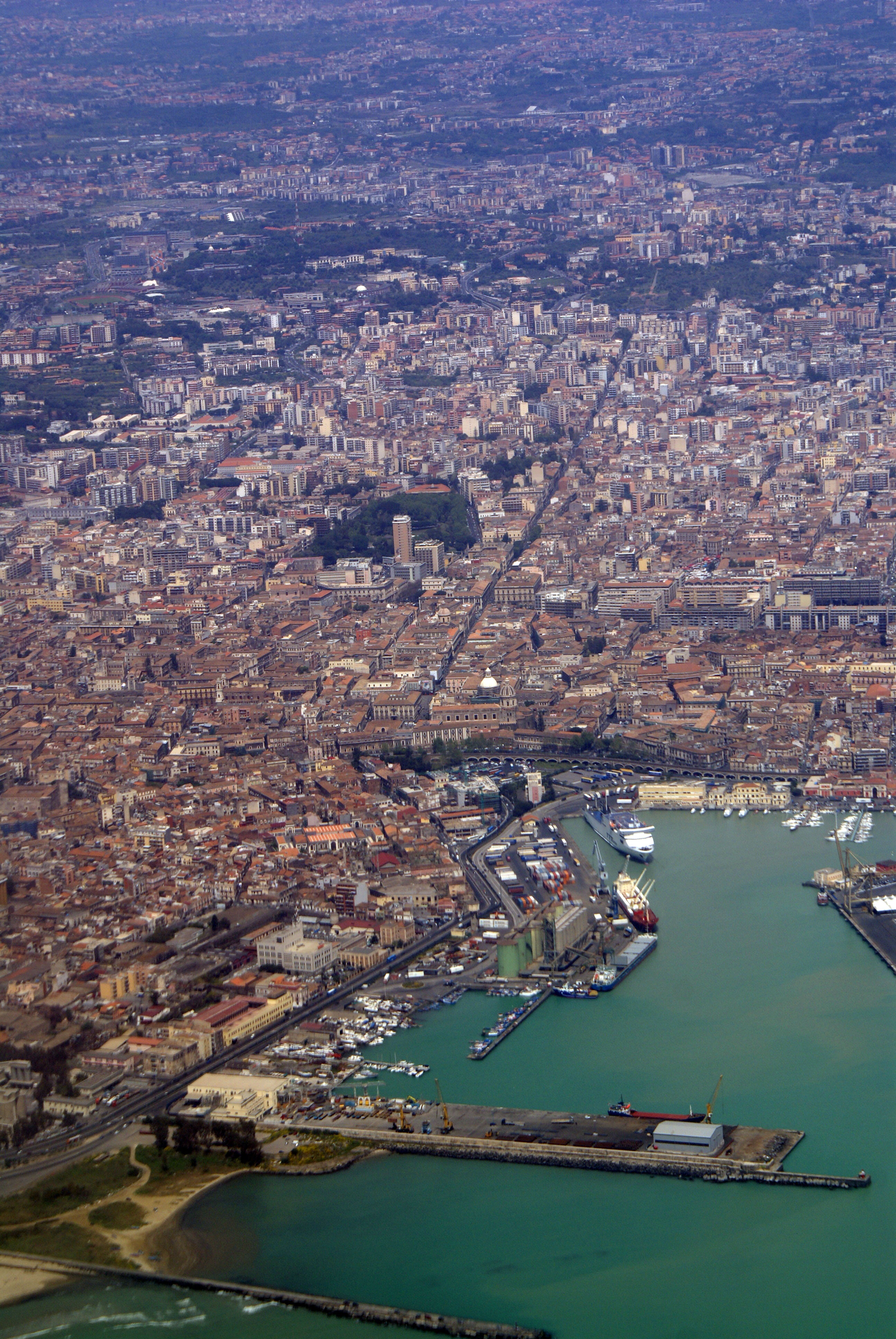 Il centro storico di Catania. La macchia verde della villa Bellini e la lunga fessura della via Etnea.